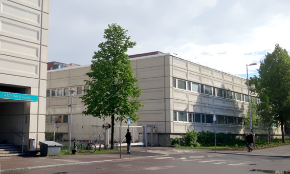 Radiotalon suurtuotantosiipi. Radiokatu 5, Helsinki. Arkkitehti: Kurt Simberg.